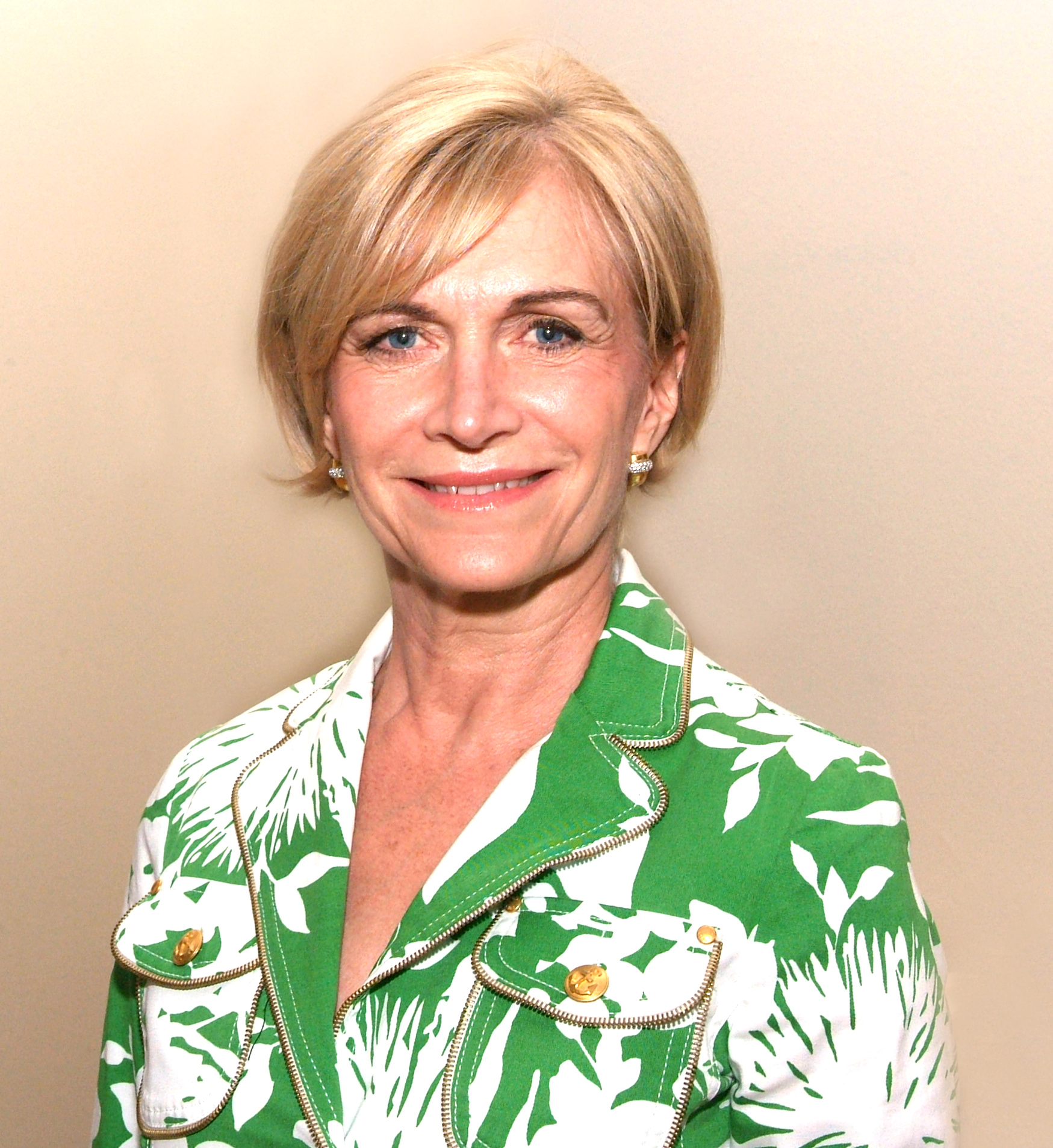 Fotografía de la Ministra del Trabajo y Previsión Social Evelyn Matthei Fornet.